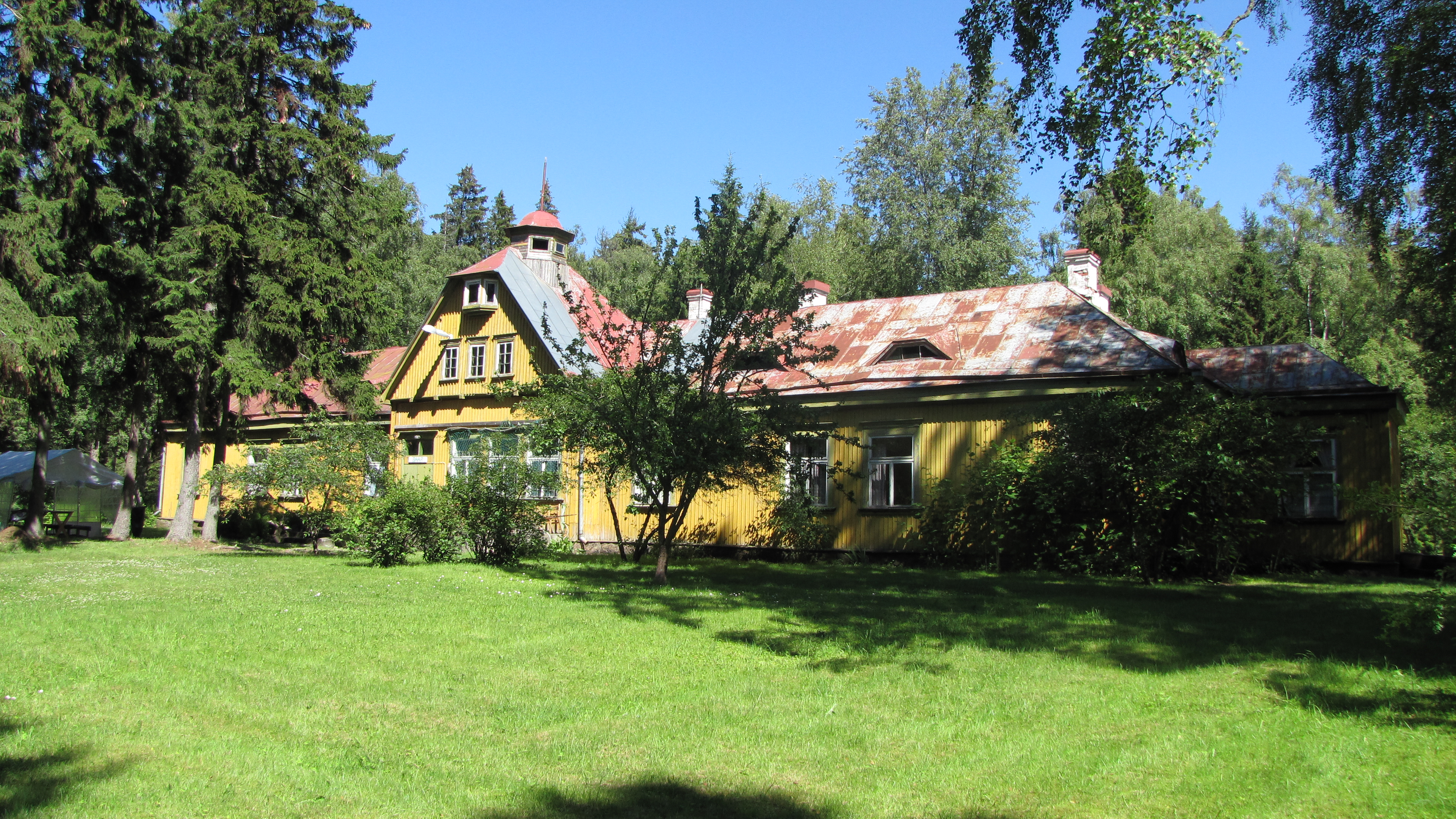 Peeter Suure Merekindluse Aegna garnisoni ohvitseride kasiino, 1914, 1930